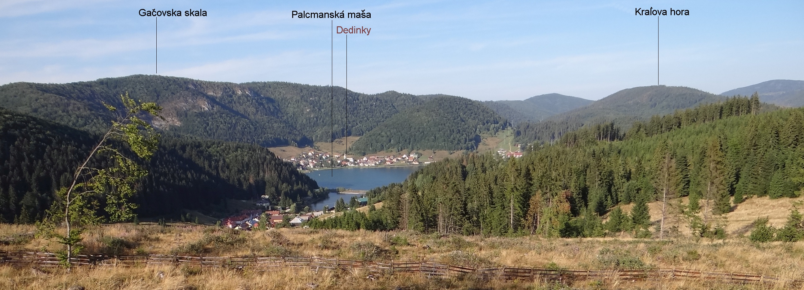 Palcmanská Maša, Dedinky, Slovenský raj